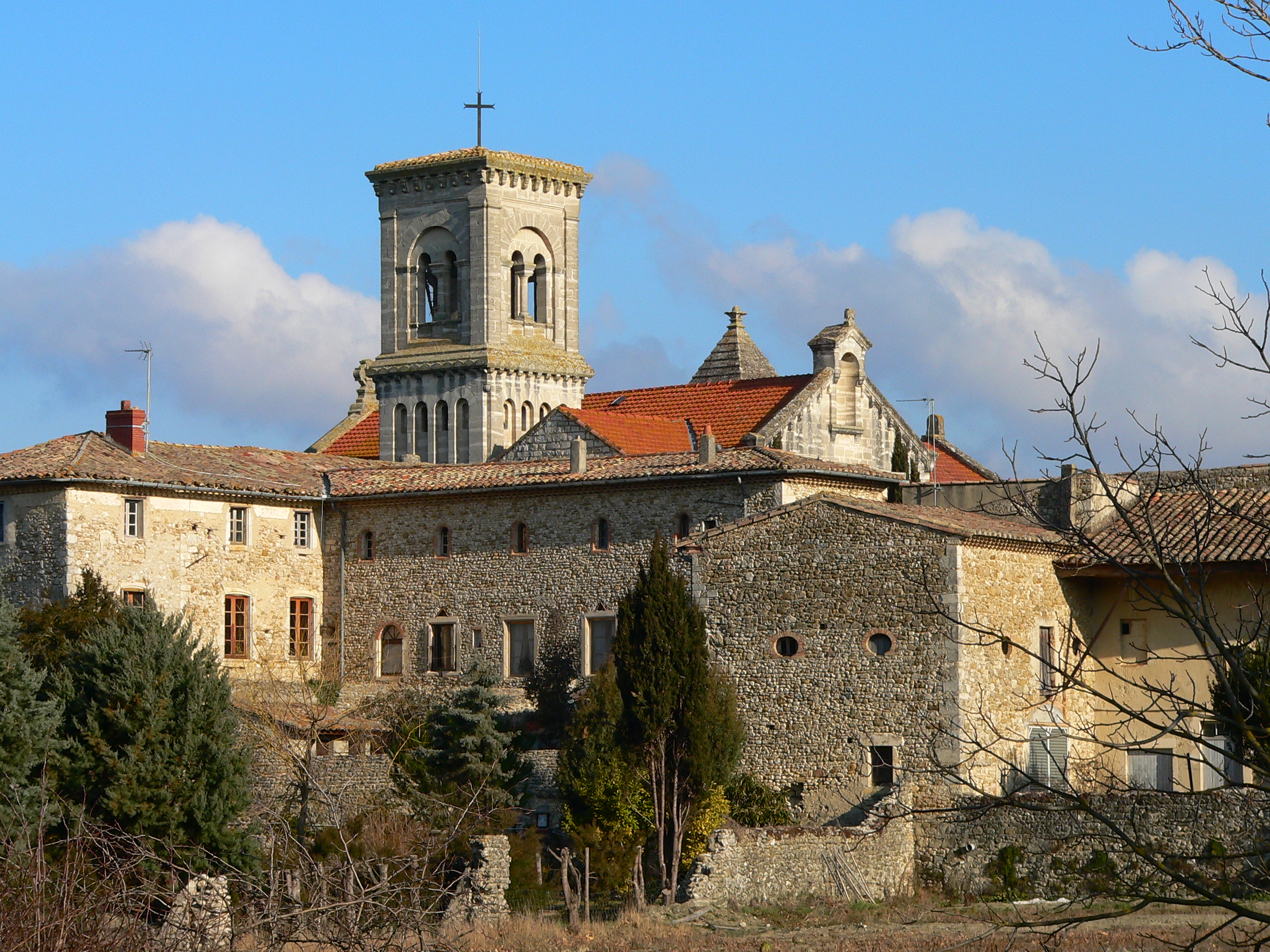 une partie de l'abbaye est classée aux Monuments Historiques